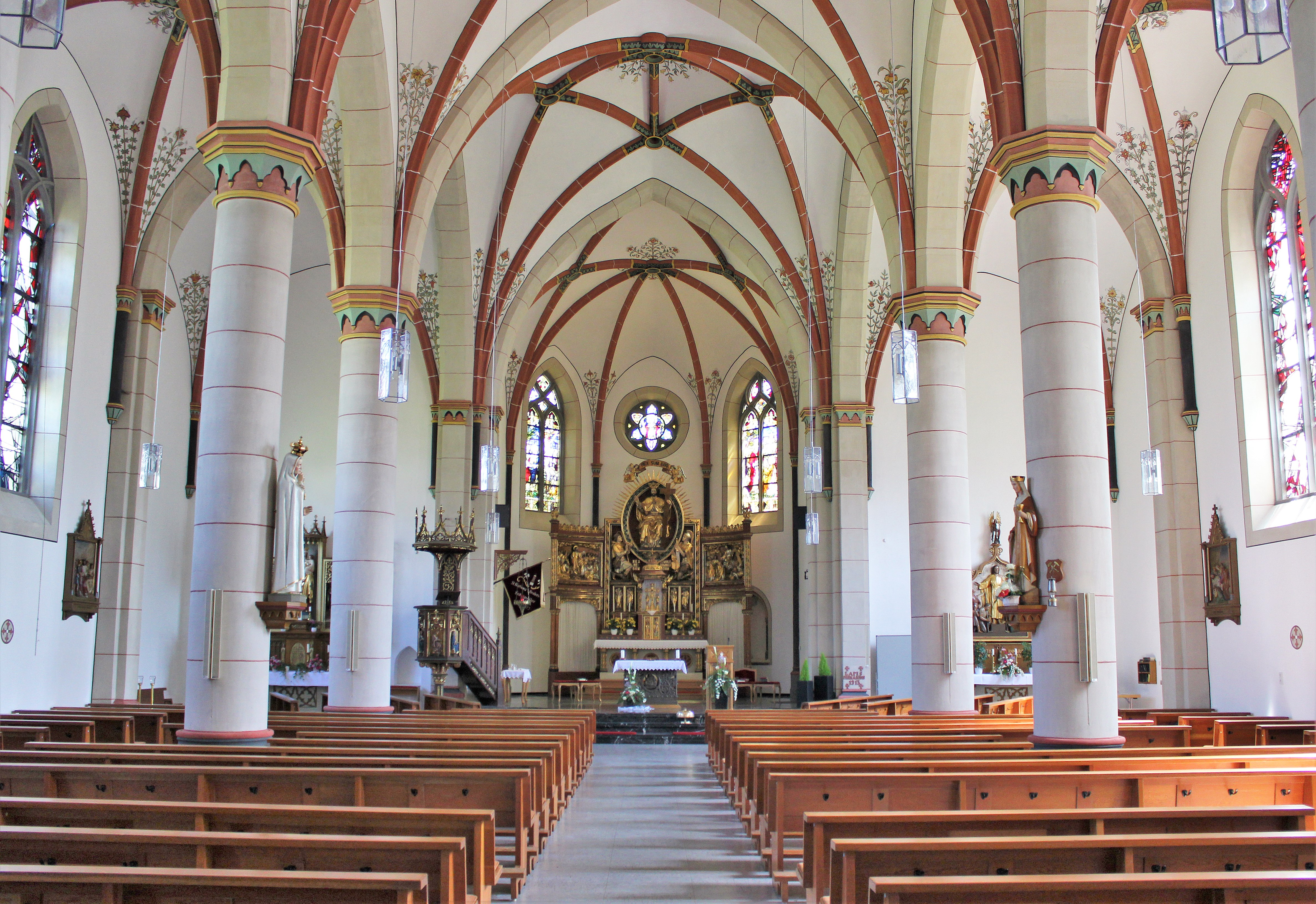 Blick ins Innere der katholischen Pfarrkirche St. Mauritius in Sotzweiler, einem Ortsteil der Gemeinde Tholey, Landkreis St. Wendel, Saarland